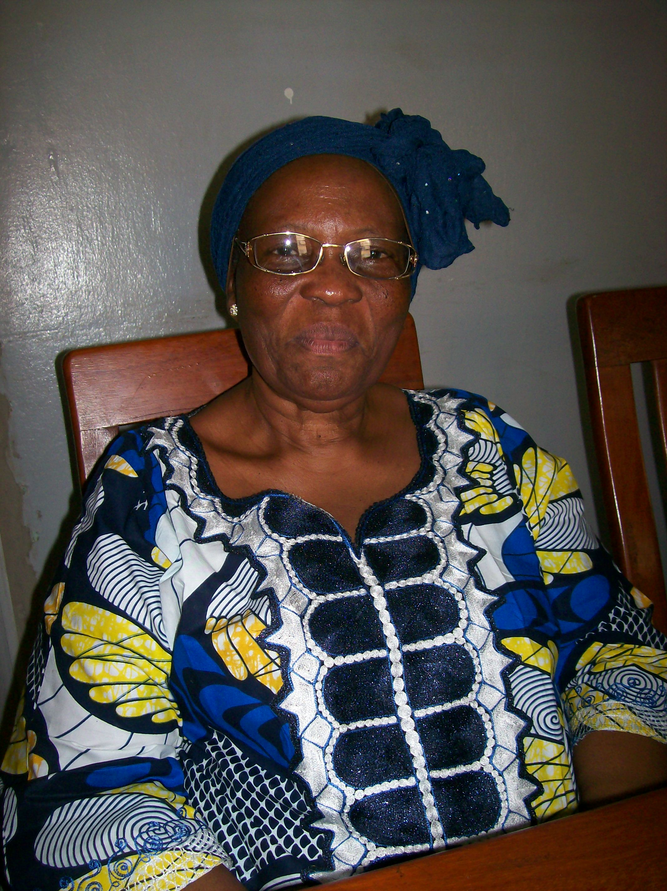 L'ancienne présidente de l'Organisation des femmes révolutionnaires du bénin est décédée le 4 janvier 2017 à Paris des suites d'une longue maladie.